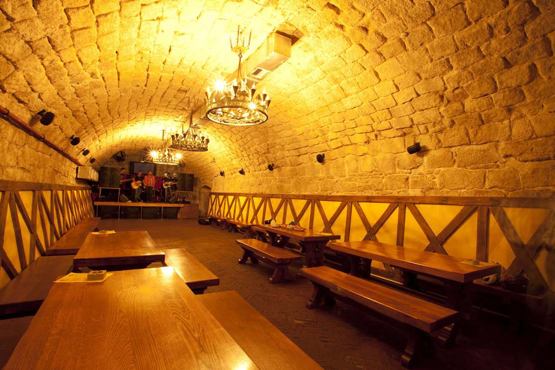 Музей пивоварения во Львове. 4 октября 2005 года по случаю 290-й годовщины со дня учреждения Львовской пивоварни открылся первый в Украине Музей пивоварения во Львове. Музей занимает площадь 600 квадратных метров полуподвальных площадей Львовской пивоварни. Экспозиция музея рассказывает об истории пивоварения во Львове и о Львовской пивоварне.